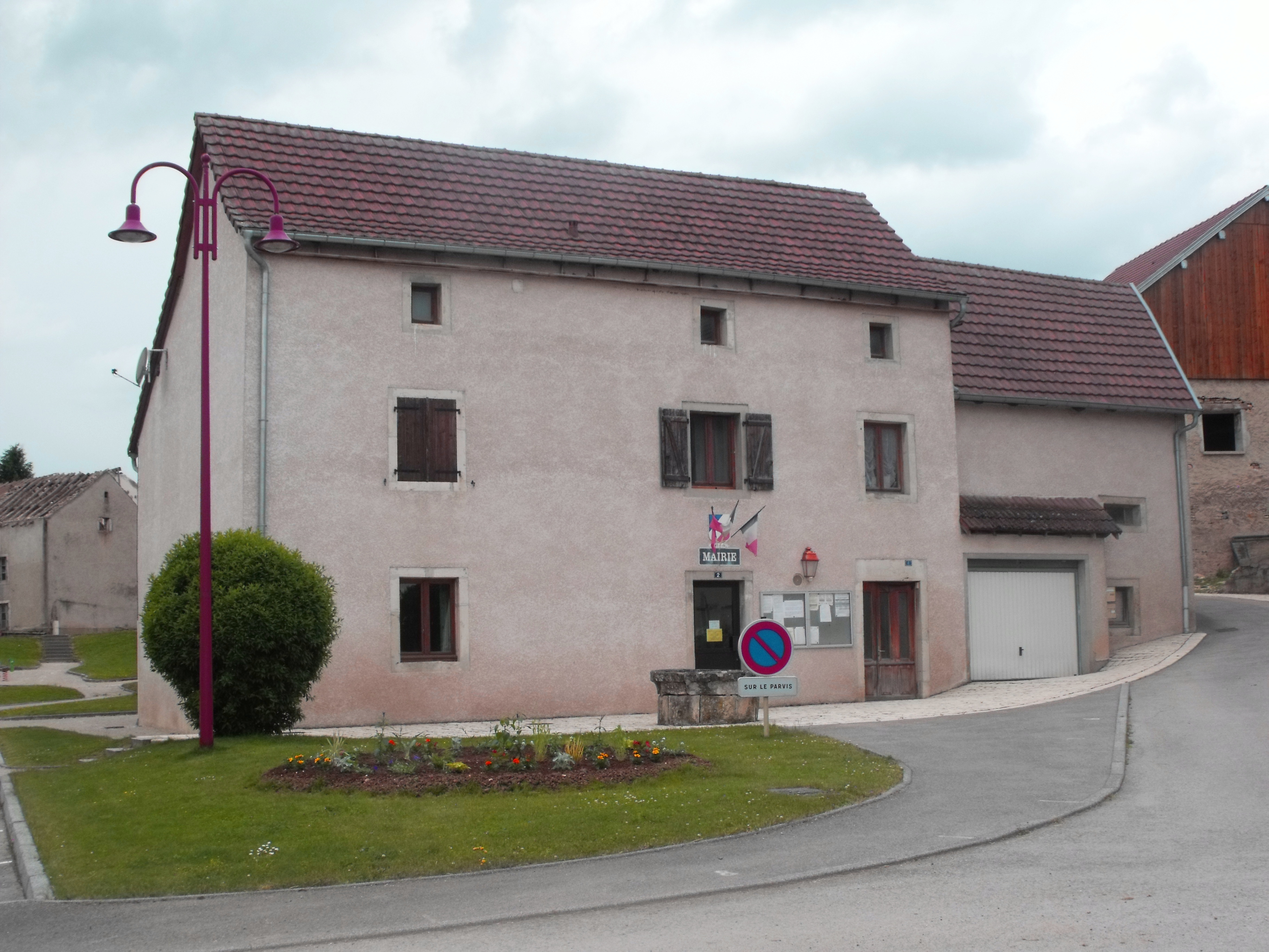 Mairie de Goux les Dambelin, Doubs, France